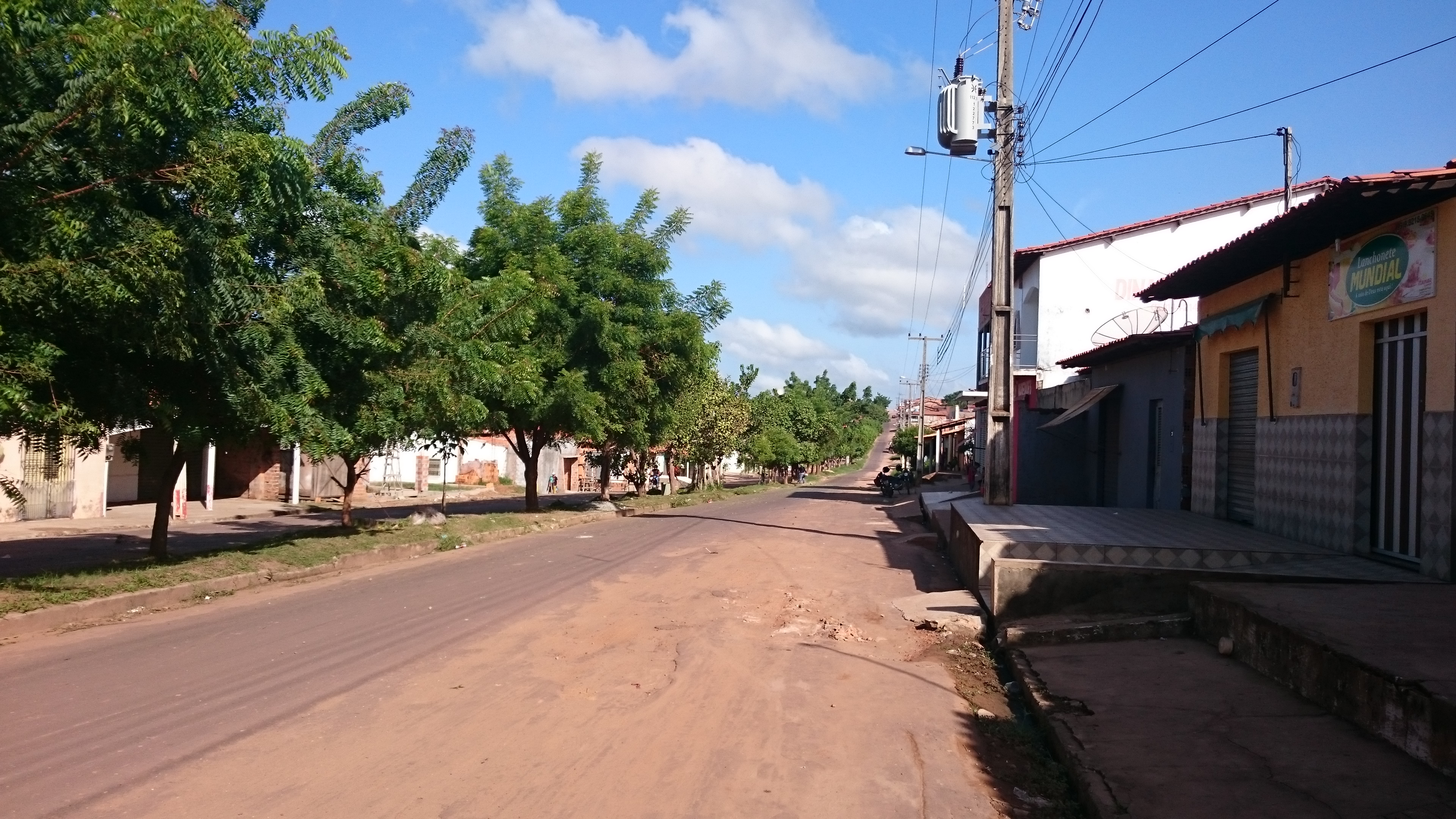 Av. Gov. Newton Bello, bairro Vieira Neto, Lago da Pedra - MA